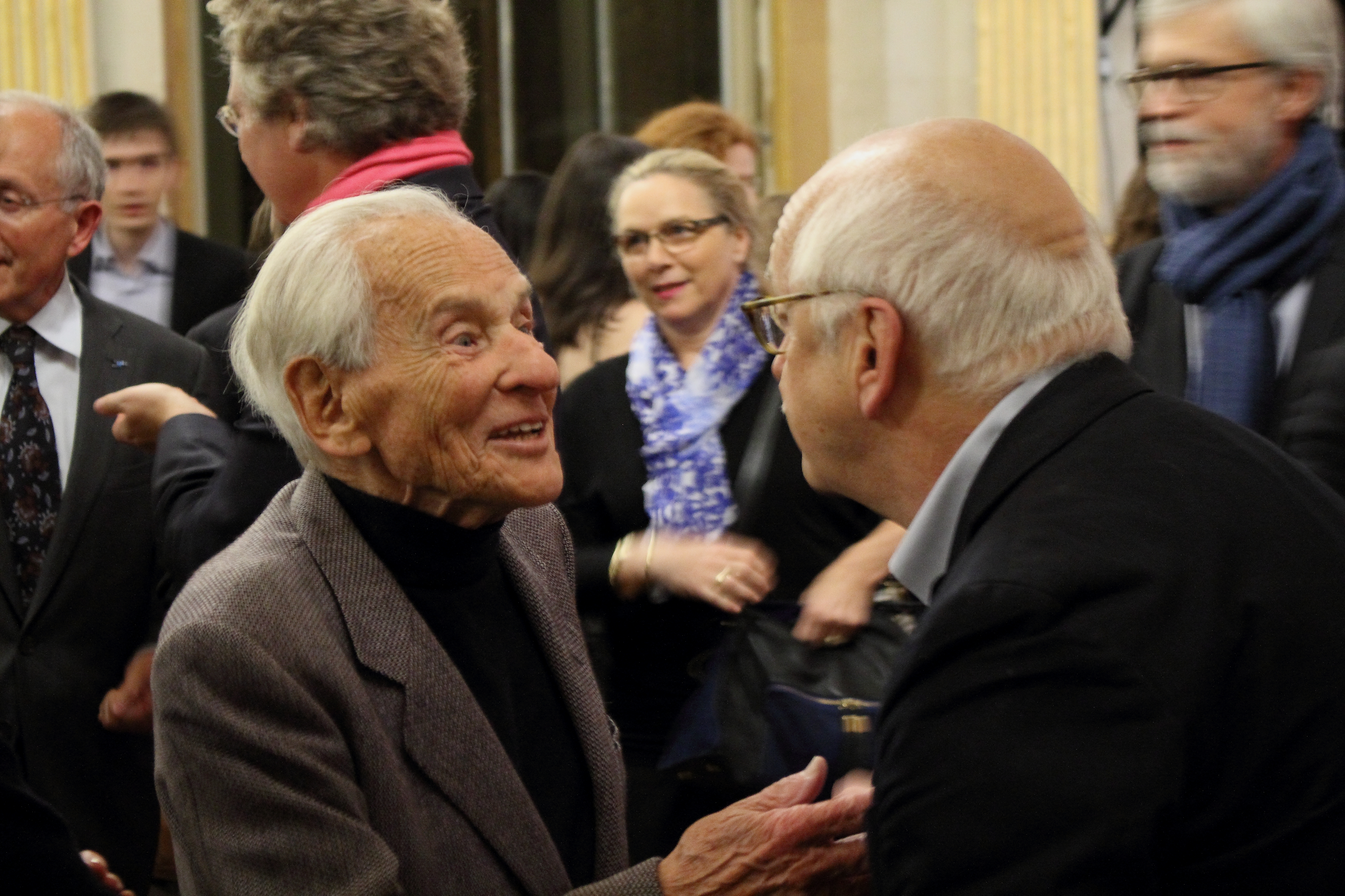 Jean d'Ormesson - Prix Clara 2015